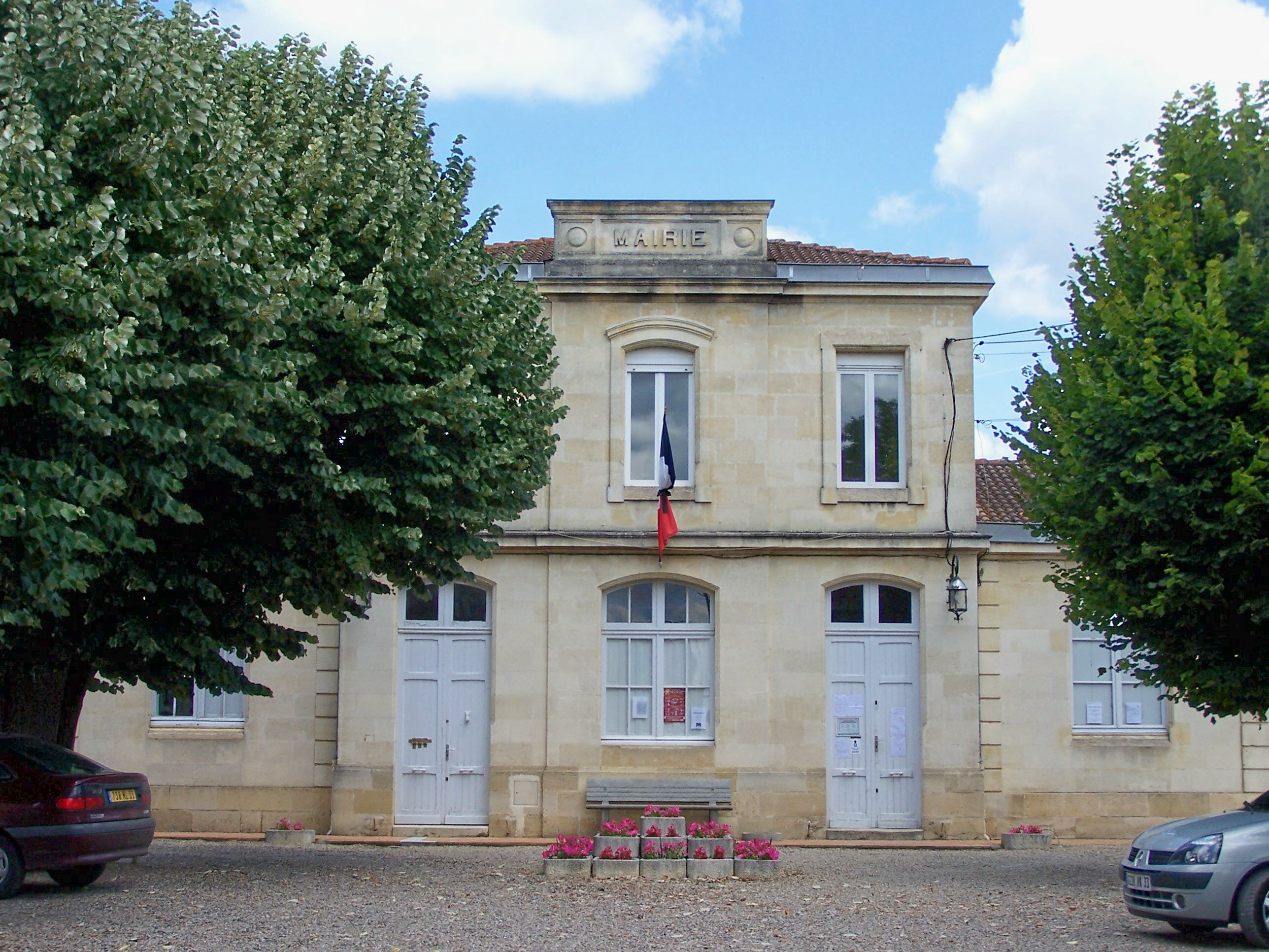 Mairie de Saint-Martin-de-Sescas, Gironde, France